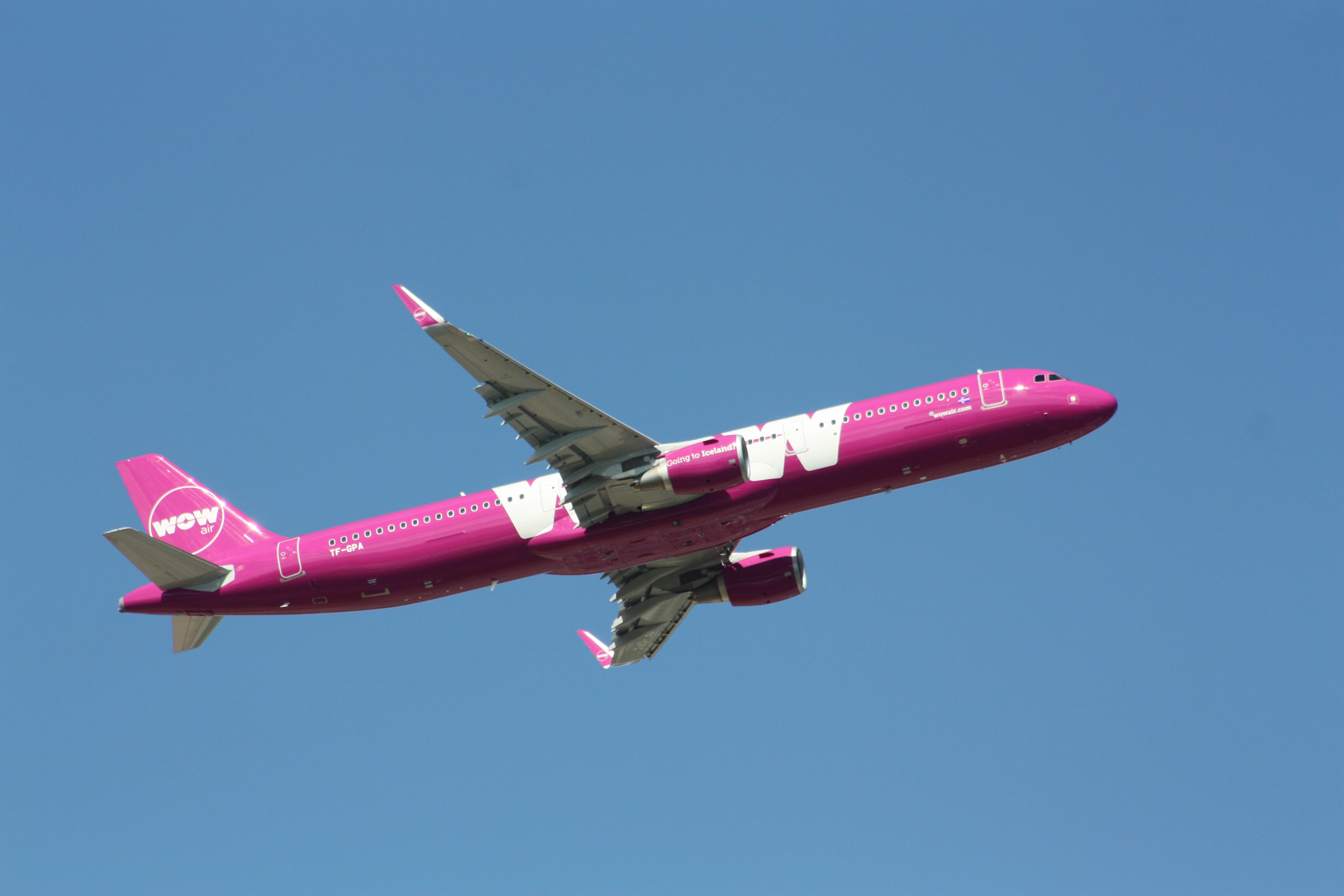 TF-GPA Gatwick 07/09/2016